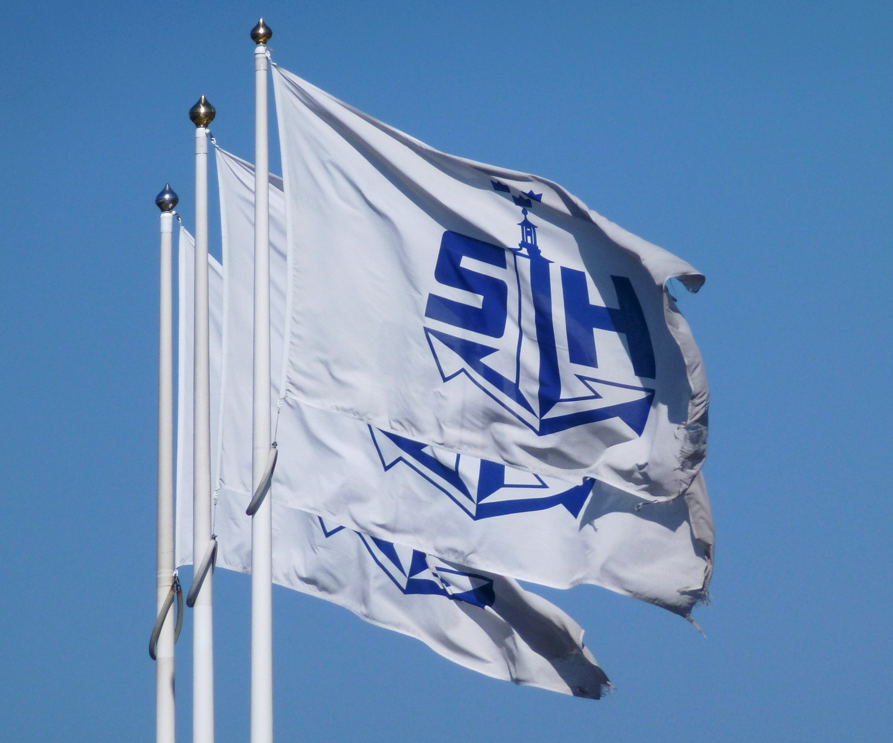 Stockholms hamnar flaggor